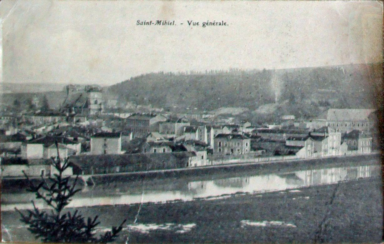 carte postale.